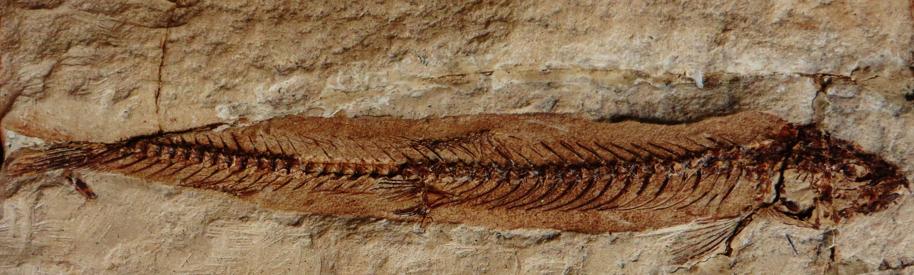 Fossil of Cobitis, an extinct fish - Took the picture at Teylers Museum, Haarlem